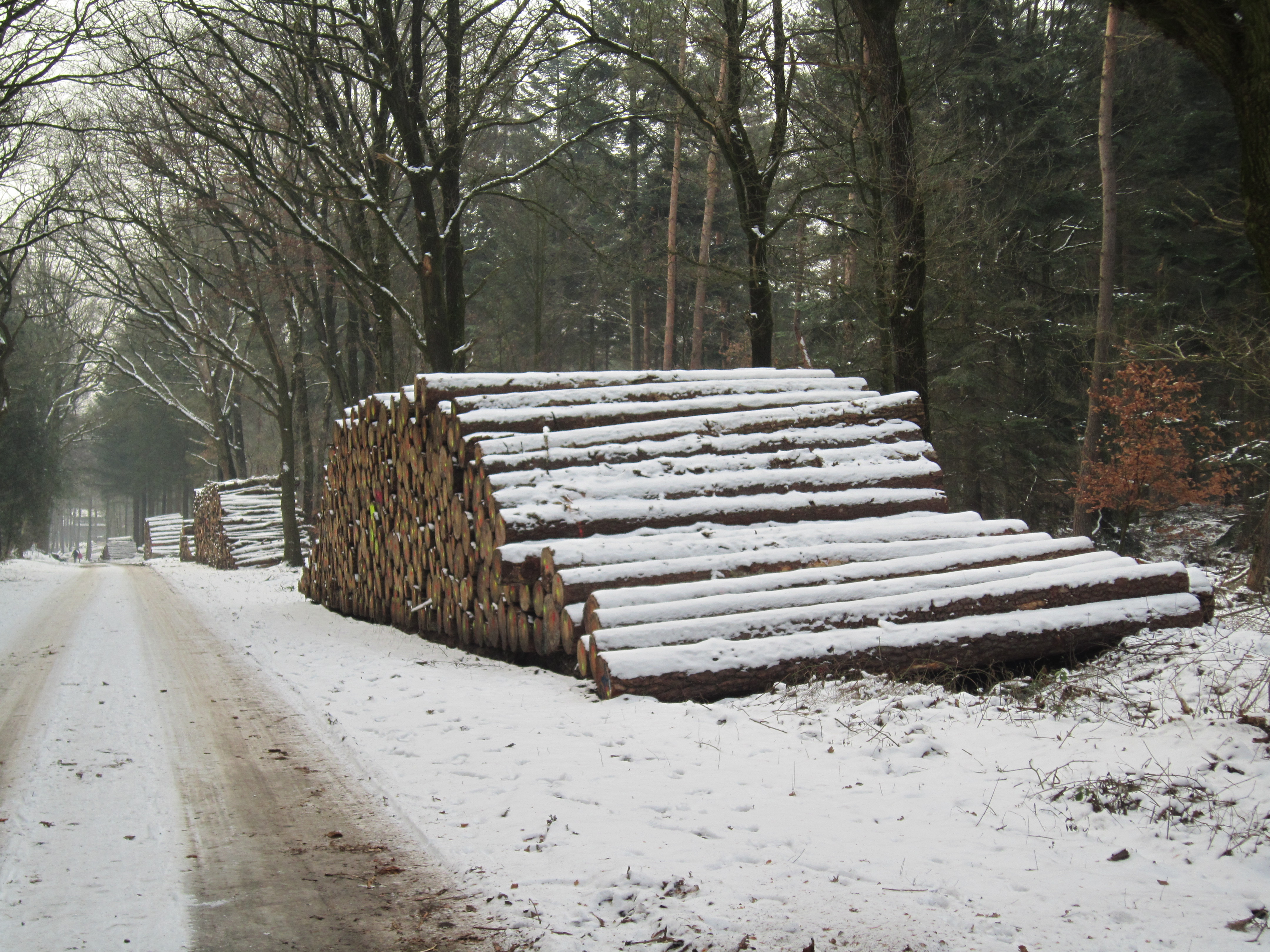 Forstweg in den Dammer Bergen vom Parkplatz am Schweizerhaus zum Aussichtsturm auf dem Mordkuhlenberg